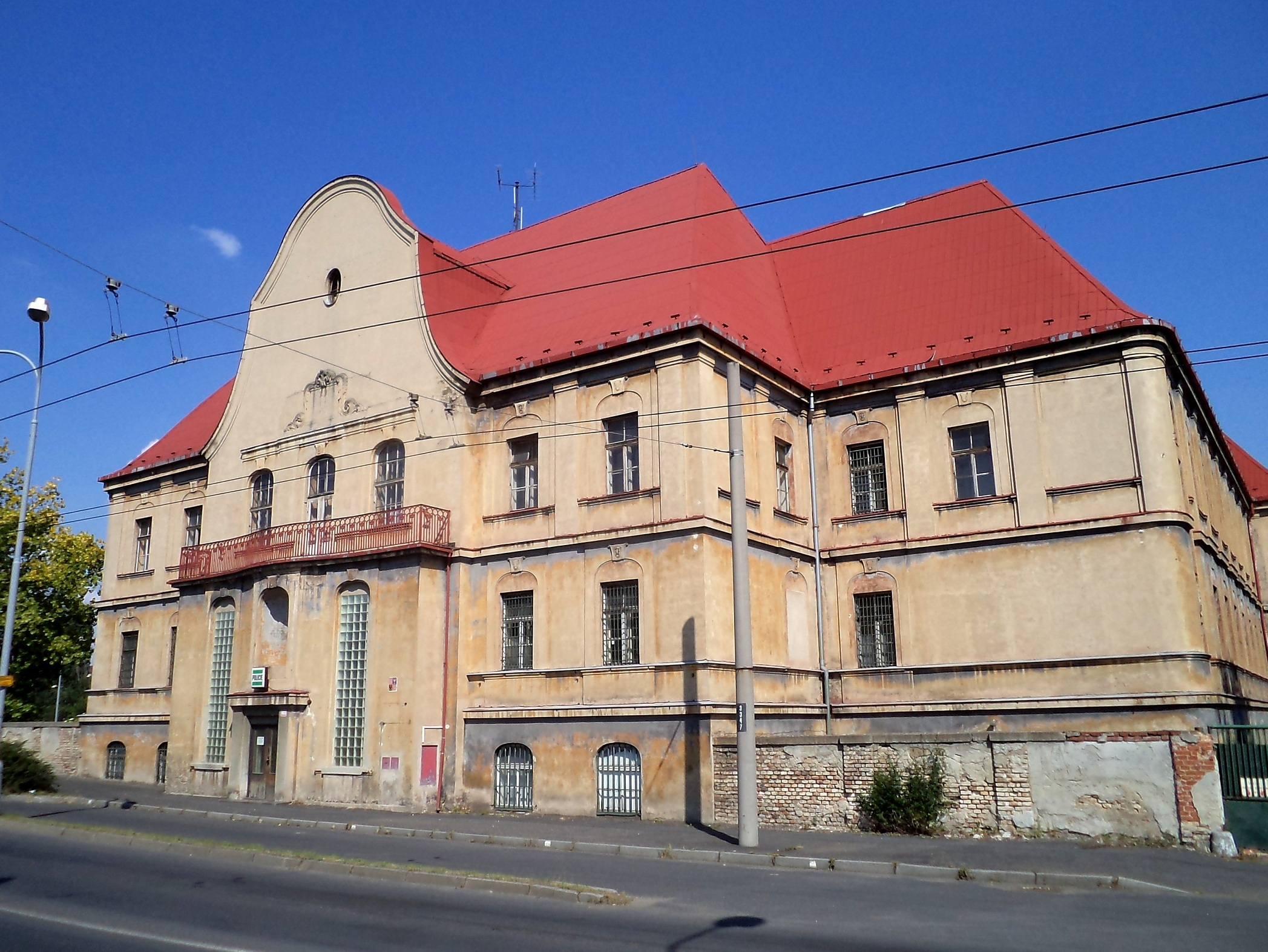 Chomutov - Budova bývalého chudobince, později sídlo Policie ČR